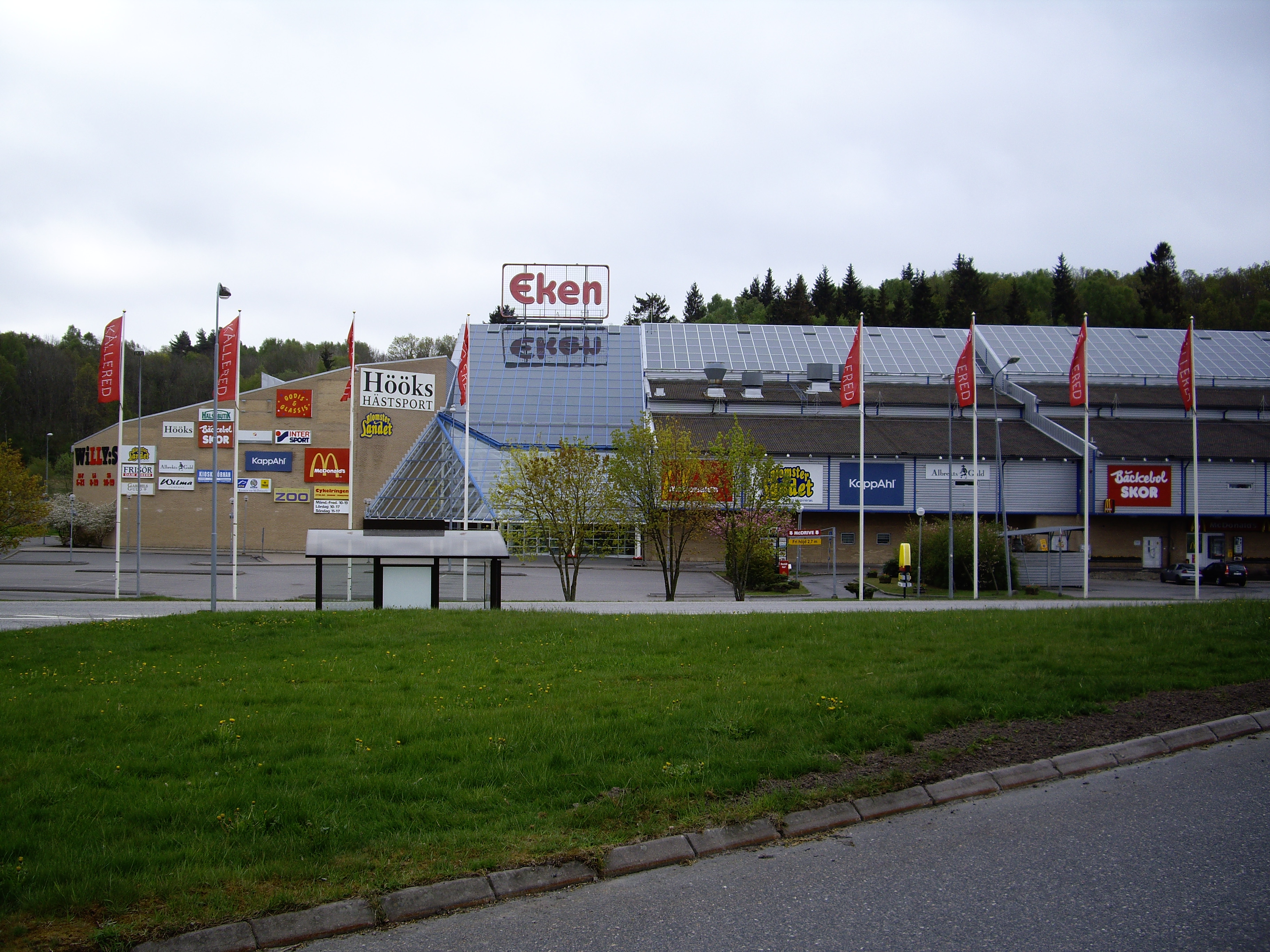 Bild på EkenCenter i Kållered